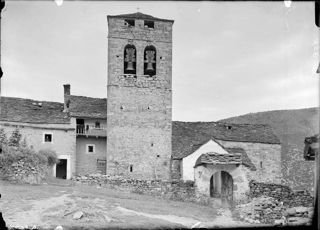 Imatge